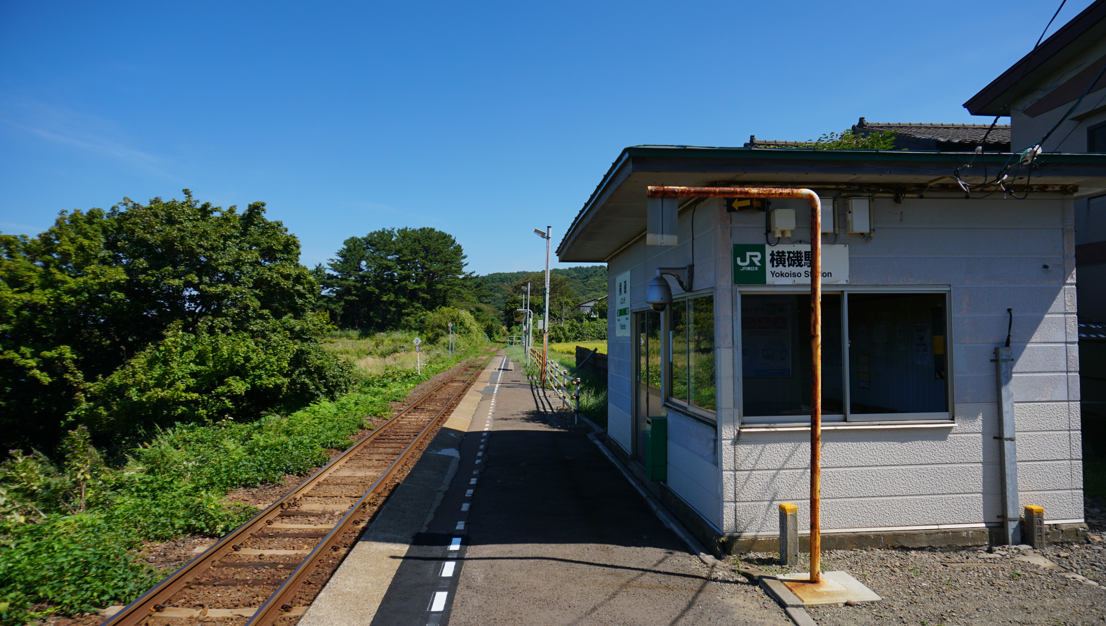 五能線 横磯駅（青森県西津軽郡深浦町）